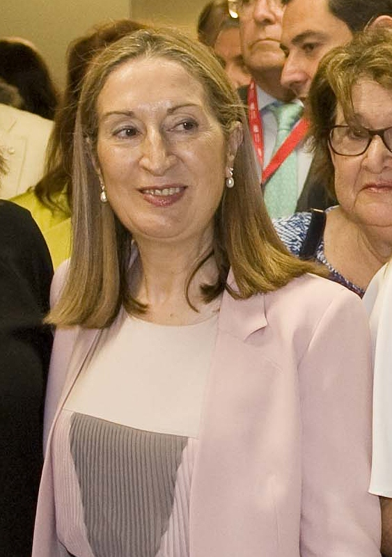 Ana Pastor 14.07.30 Inau.Metro de Malaga 15